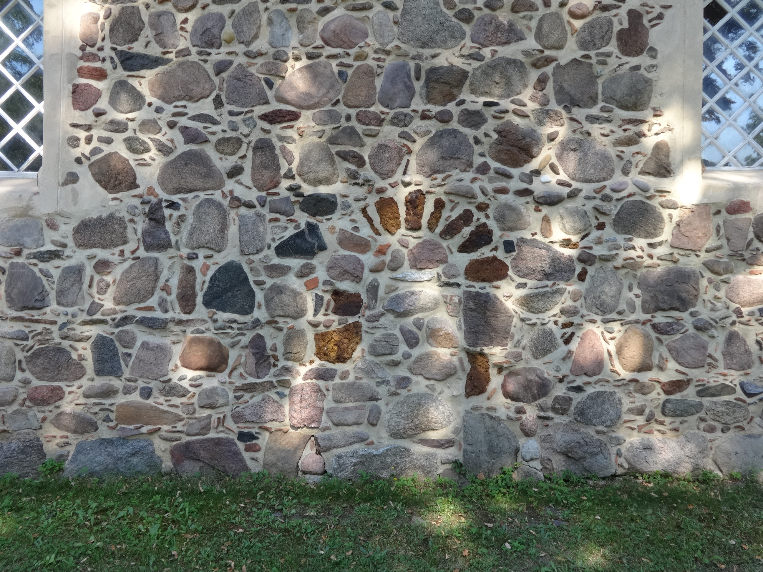 Die Dorfkirche in Liepe wurde vermutlich um 1300 aus Feldsteinen errichtet und 1734 barock überformt. In ihrem Innern befinden sich unter anderem eine Kanzel aus dem Anfang des 18. Jahrhunderts sowie ein Altarretabel aus der ersten Hälfte des 19. Jahrhunderts.